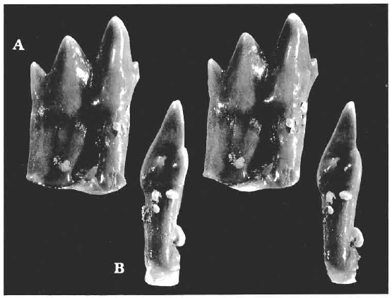 Dyskritodon amazighi gen. et sp. n., right lower molar, holotype SA 92; top, labial view; bottom, anterior view. Stereophotos; x 20.